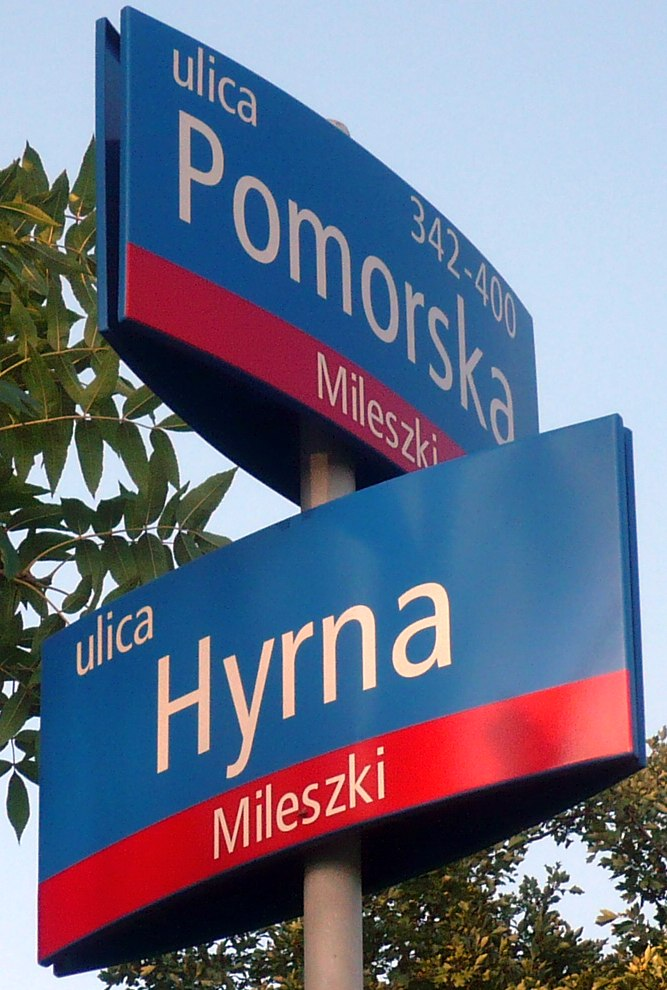 Przykład błędnego oznakowania skrzyżowania - zamiast nazwy ulicy Arniki widnieje ul. Hyrna